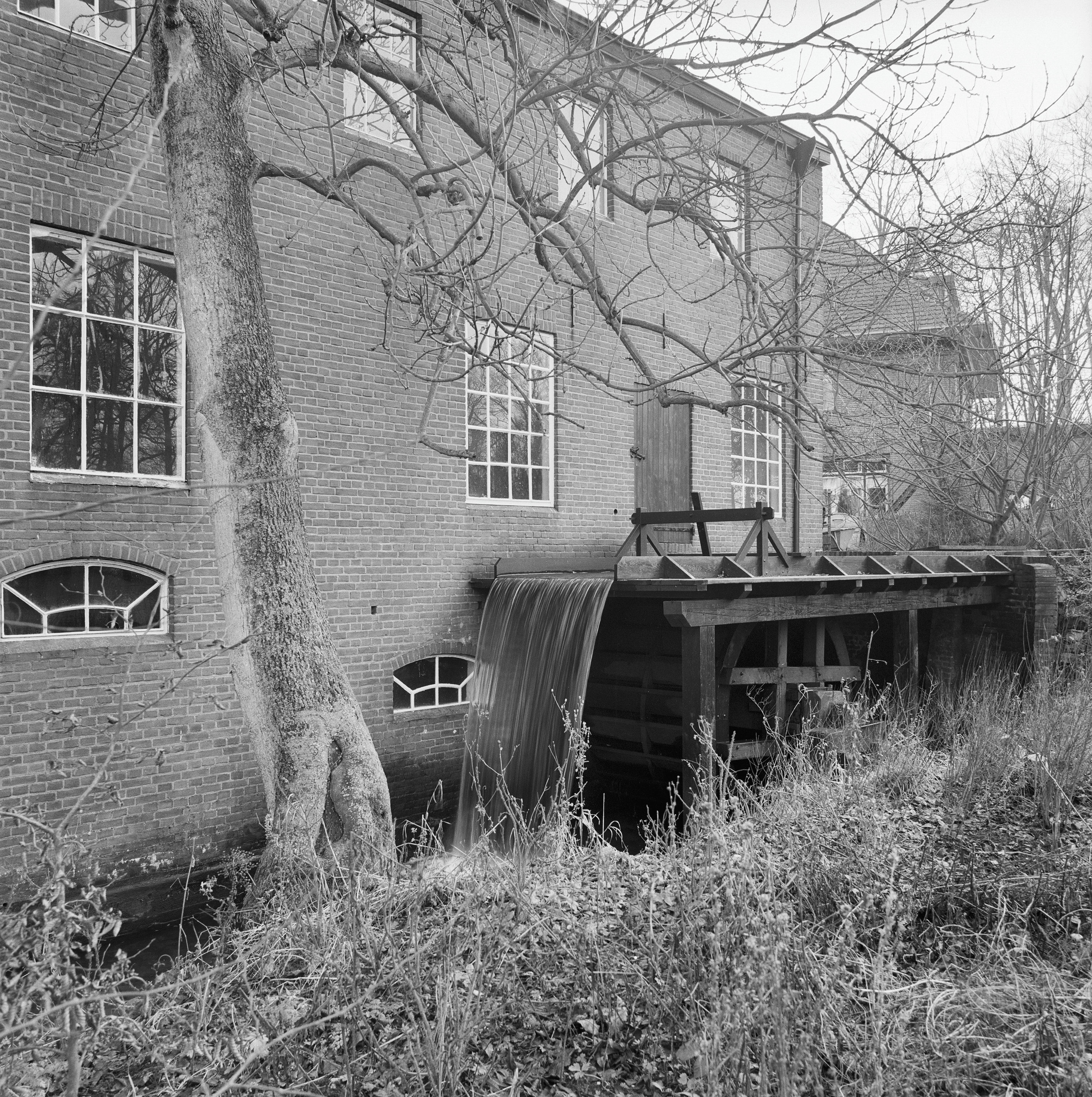 De Ruitersmolen: Ruitersmolen, watergoot met daaronder een bovenslag rad.